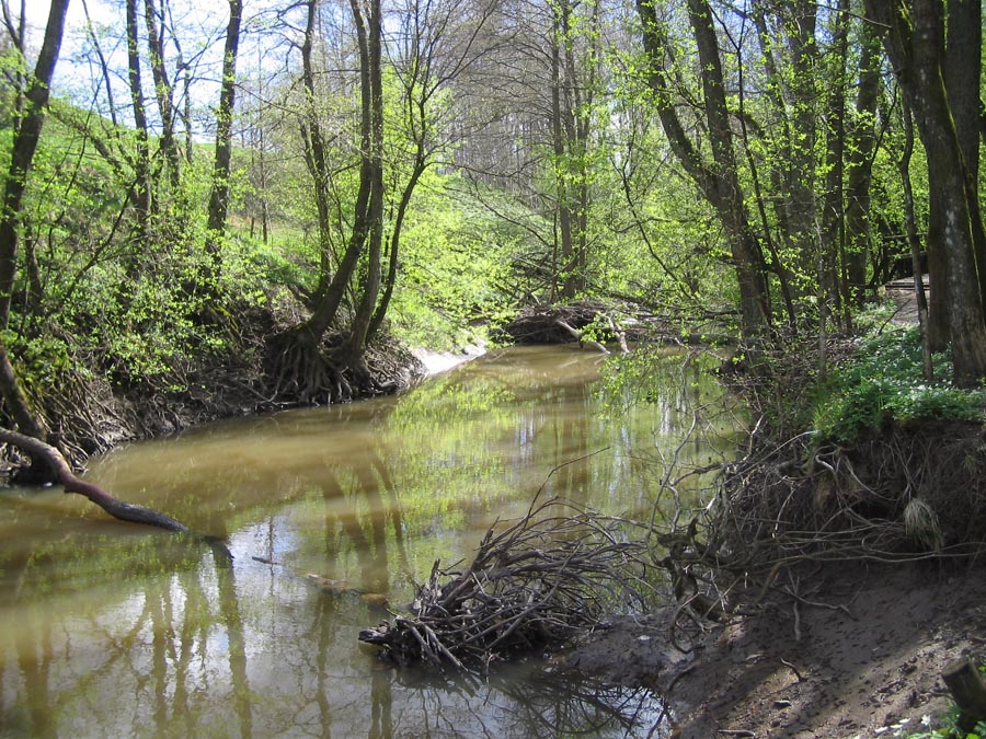 Lärjeån i Lärjedalen... Foto: Philippe